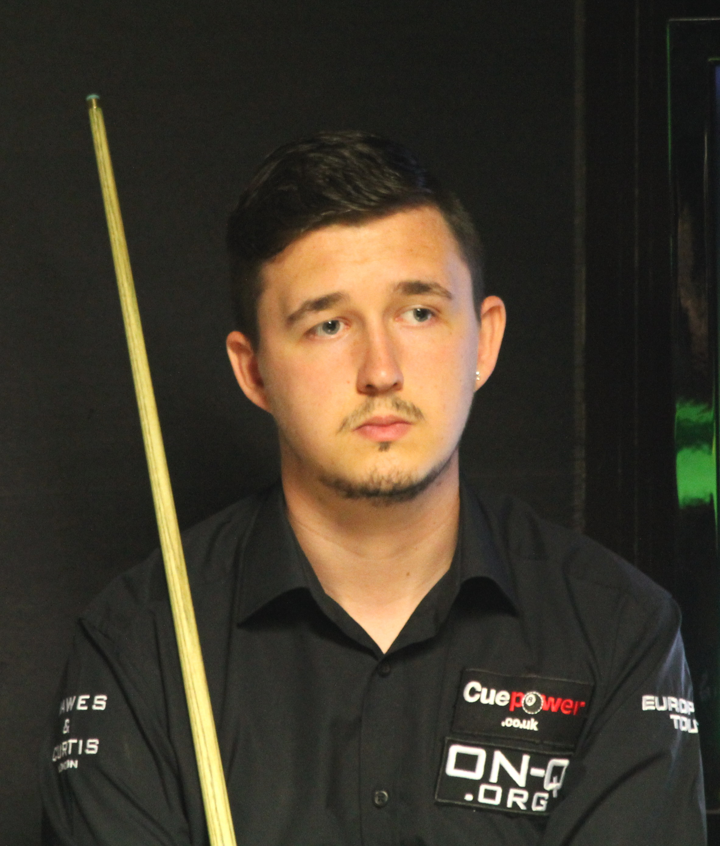 Kyren Wilson beim Paul Hunter Classic 2014